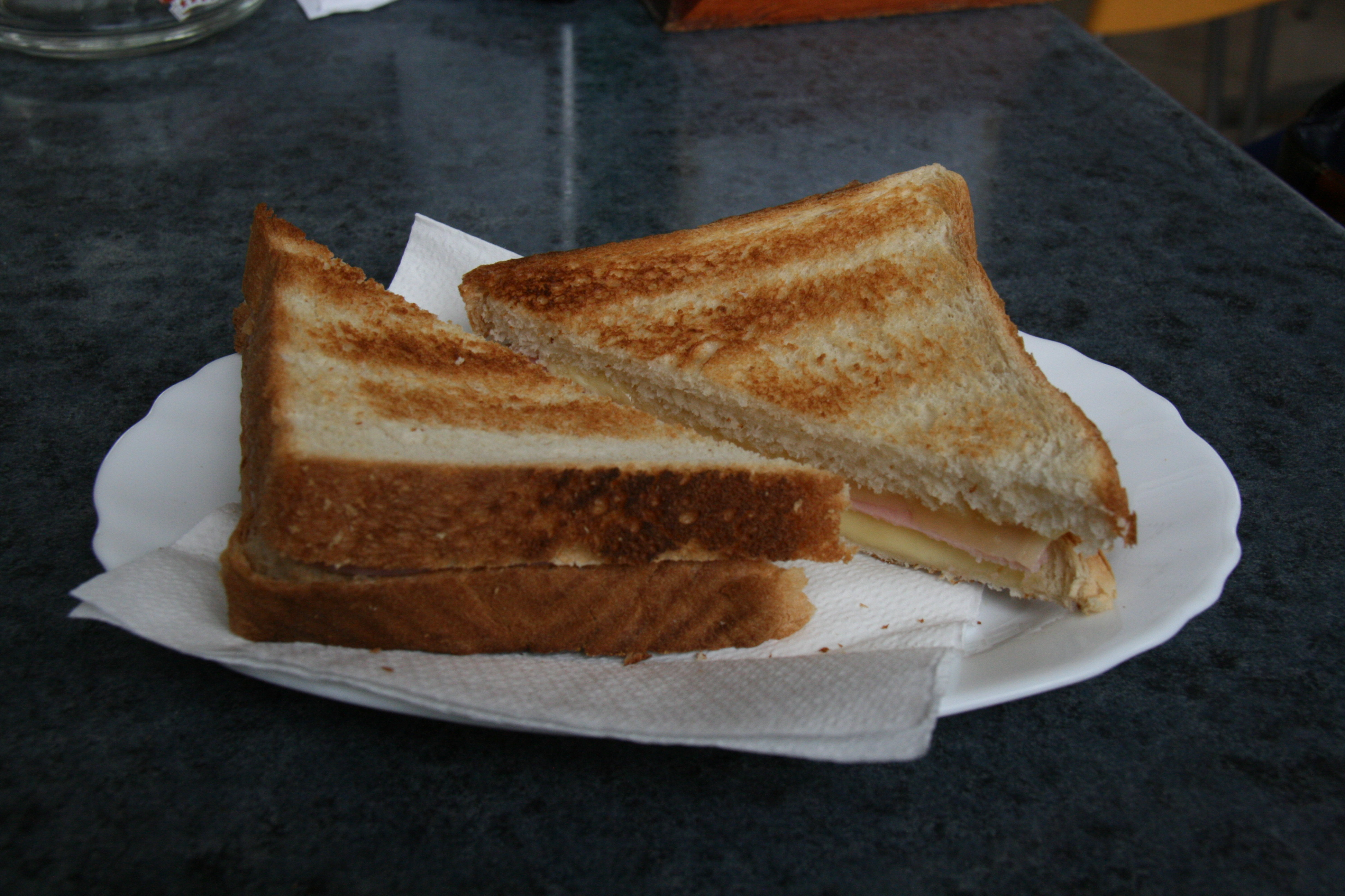 Sandwich mixto (extra de queso)